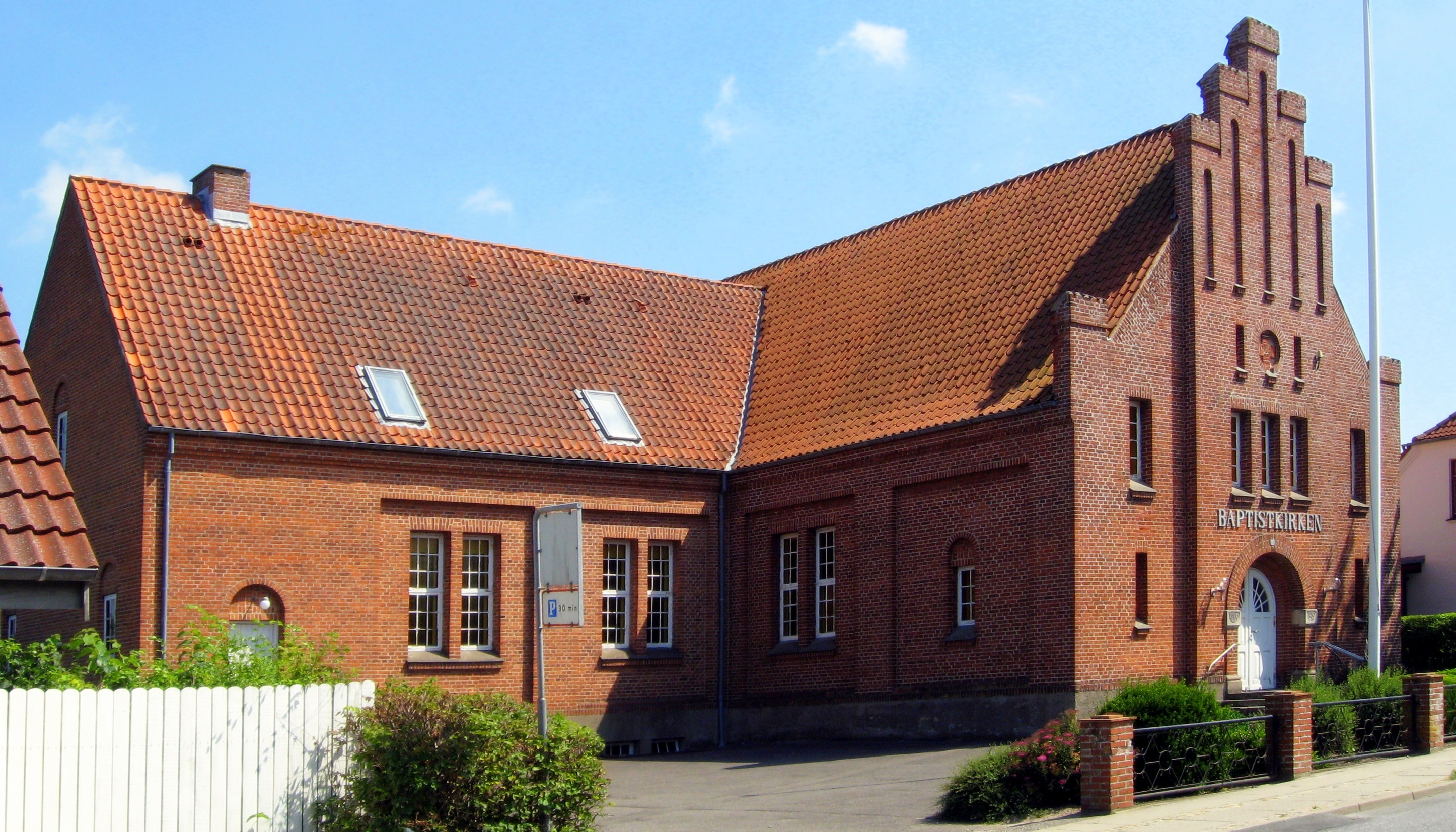 Baptistkirken i Brovst, Jammerbugt Kommune